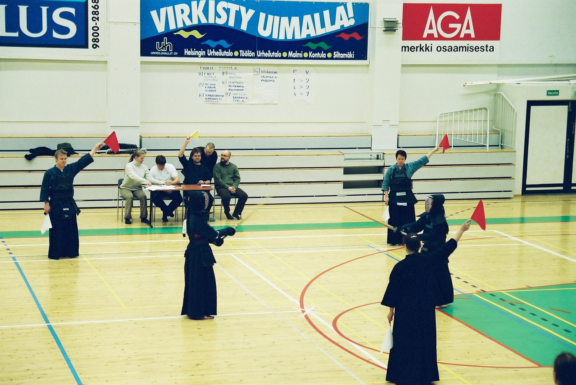 Kendo shiai tuomarit liputtavat pisteen punaiselle kilpailijalle kendon yksilö SM-kisoissa Helsingissä joulukuussa 2002